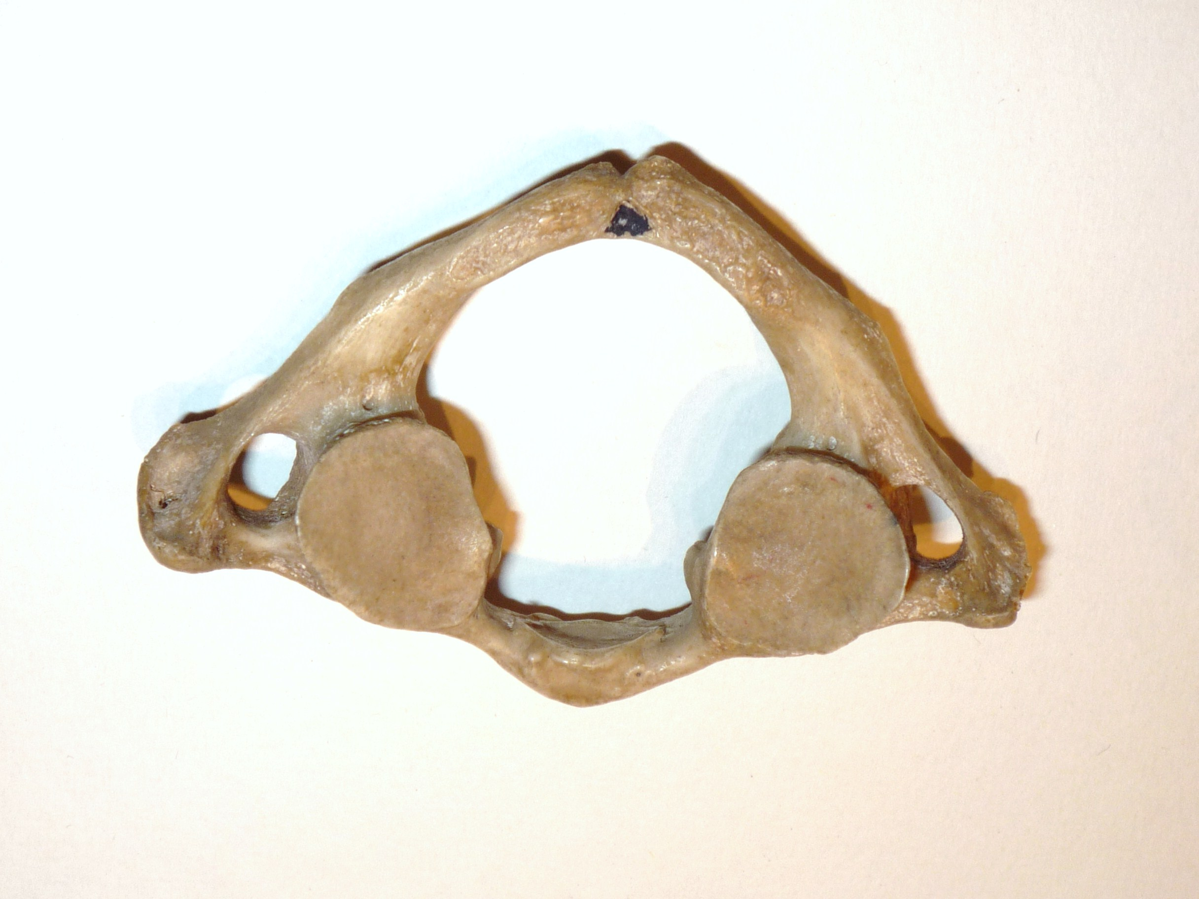 Atlante, prima vertebra cervicale, vista inferiore